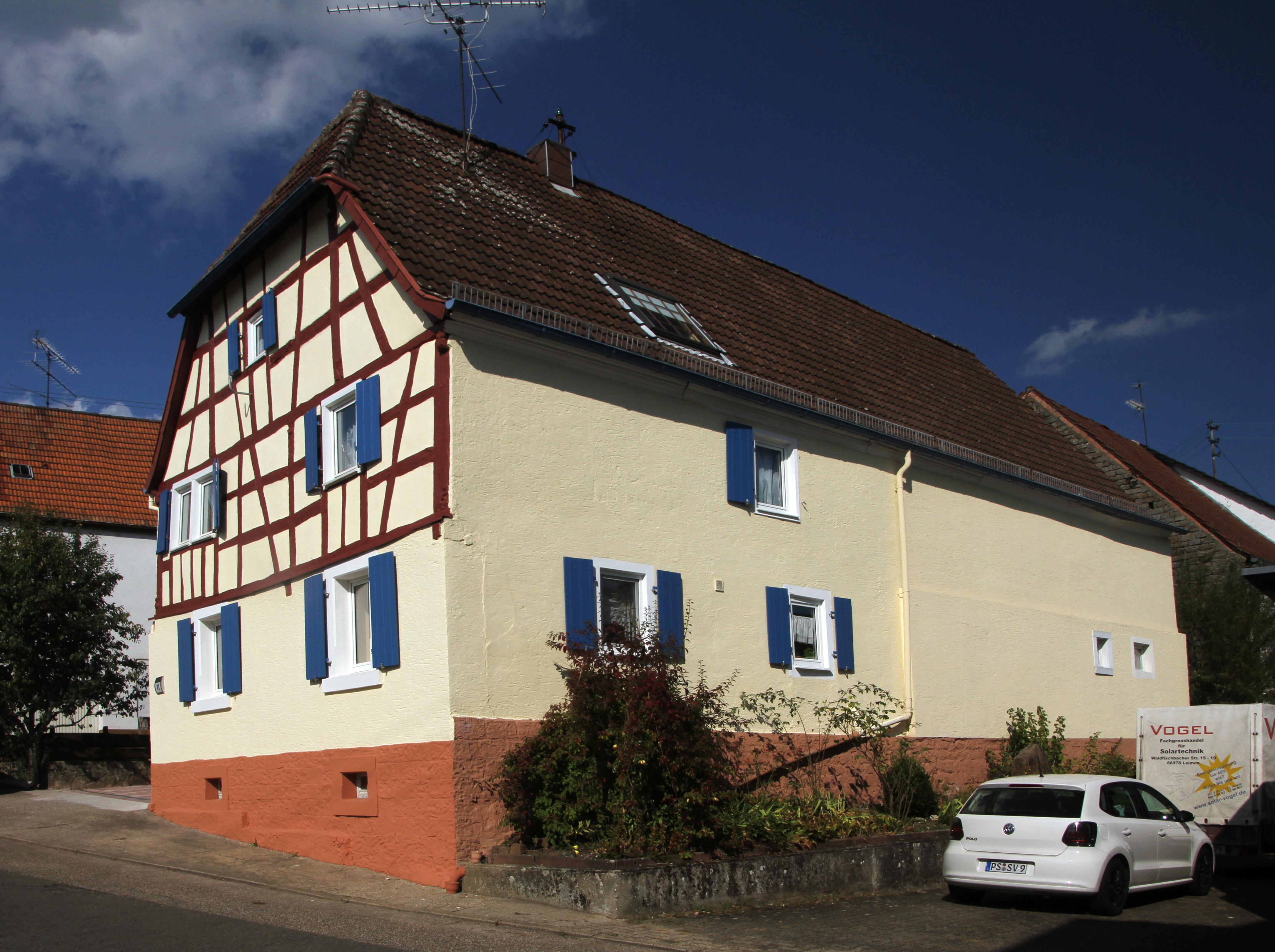 Leimen (Pfalz) Pfarrstrasse 11-Quereinhaus